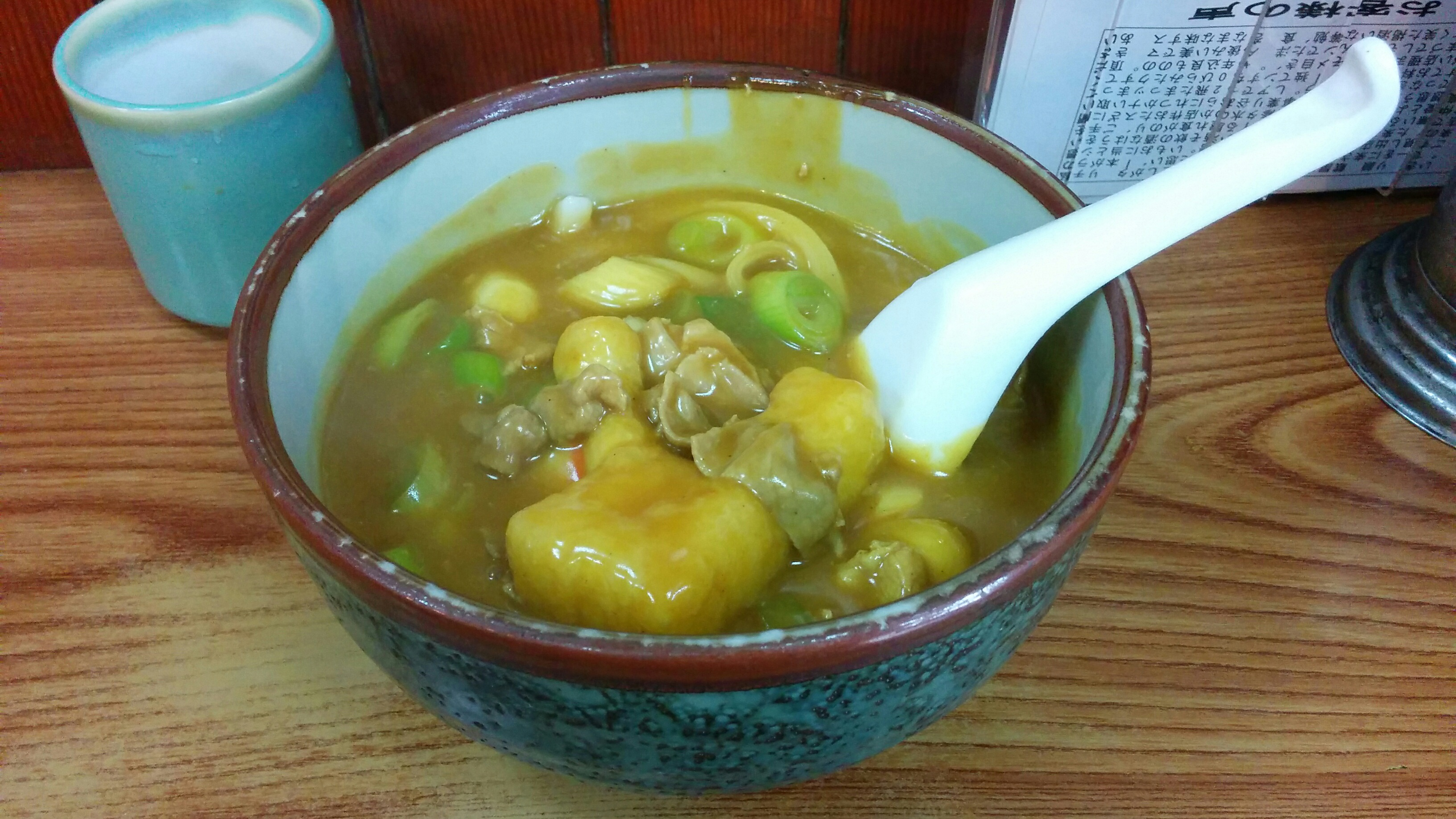 名古屋カレーうどん。「本店 鯱乃家」（ Japan 愛知県名古屋市北区田幡二丁目14番1号）にて2016年11月15日撮影。